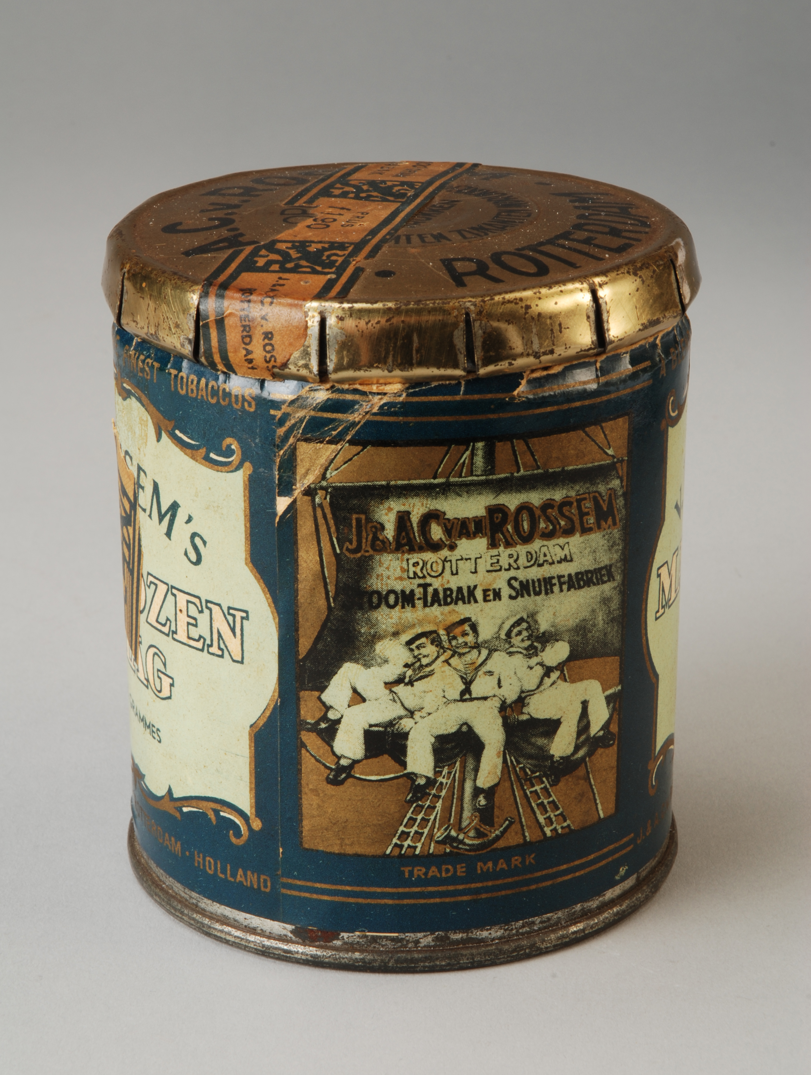 Objectgegevens Titel: Rond blik met los deksel, Van Rossem’s Matrozenshag, blauw, lichtblauw en goudkleurig Beschrijving: Rond shagblik, rondom beplakt met etiket, met klik-klakdeksel. Op voorkant en achterkant afbeelding in kleur van drie matrozen, pijp rokend in het want. Op zijkanten tekst in sierlijke omlijsting. Op deksel, over zijkanten, restant banderol. Herkomst: Collectie Meijer, Rotterdam. Trefwoorden: shagblik, blik, productverpakking, houder Opschrift / merk: Bovenkant: "A.C. v. ROSSEM / ROTTERDAM", "OP ... DRUKKEN", "...UITEN ZIJKANTEN INDRUKKEN". Dekselrand: "PATENT No 13279". Zijkanten: "V. ROSSEM'S / MATROZEN / SHAG", "100 GRAMMES", "A BLEND OF THE FINEST TOBACCOS", "J. & A.C. v. ROSSEM . ROTTERDAM . HOLLAND". Voor- en achterkant: "J. & A.C. VAN ROSSEM / ROTTERDAM", "STOOM-TABAK EN SNUIFFABRIEK" [in afbeelding], "TRADE MARK". Op banderol: "100 GRAM / TABAK", "PRIJS / F 1.90", "J. & A.C. v. ROSSEM / ROTTERDAM". Vervaardiger: opdrachtgever: J. & A.C. van Rossem Plaats vervaardiging: Nederland Datering: 1930 - 1940 Technieken: blik, vertind, geperst Materiaal: metaal, papier Afmetingen: (cm) hg 10,0 / dm 8,5 Associatie: reclame, verpakken, roken, tabak, pijptabak, Matrozen shag, shag, Van Rossem, Rotterdam Vorm & decoratie: verpakking, figuur, man, matroos Inventarisnr: Museum Rotterdam 77201-A-B